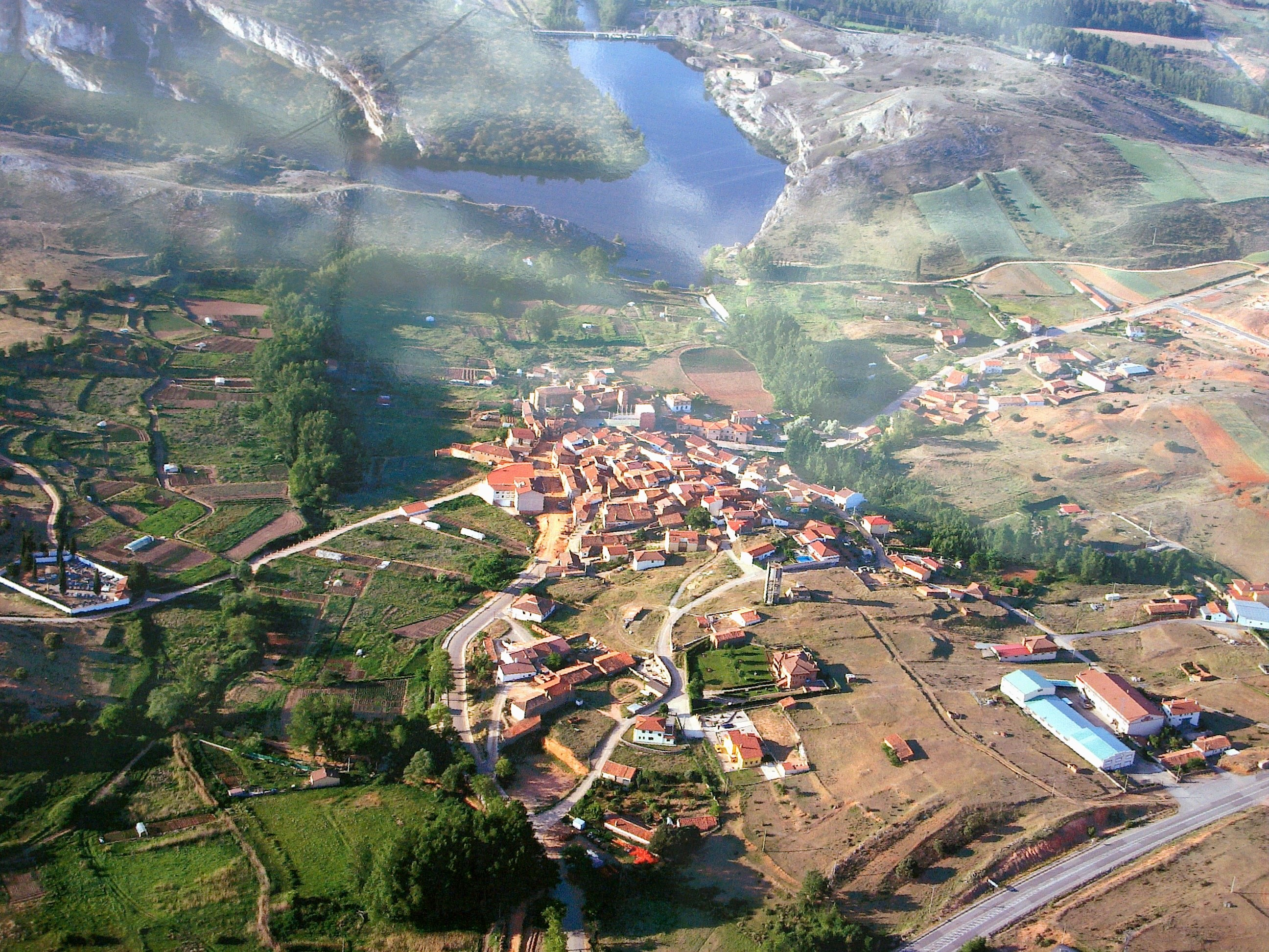 Ikuspegi orokorra.